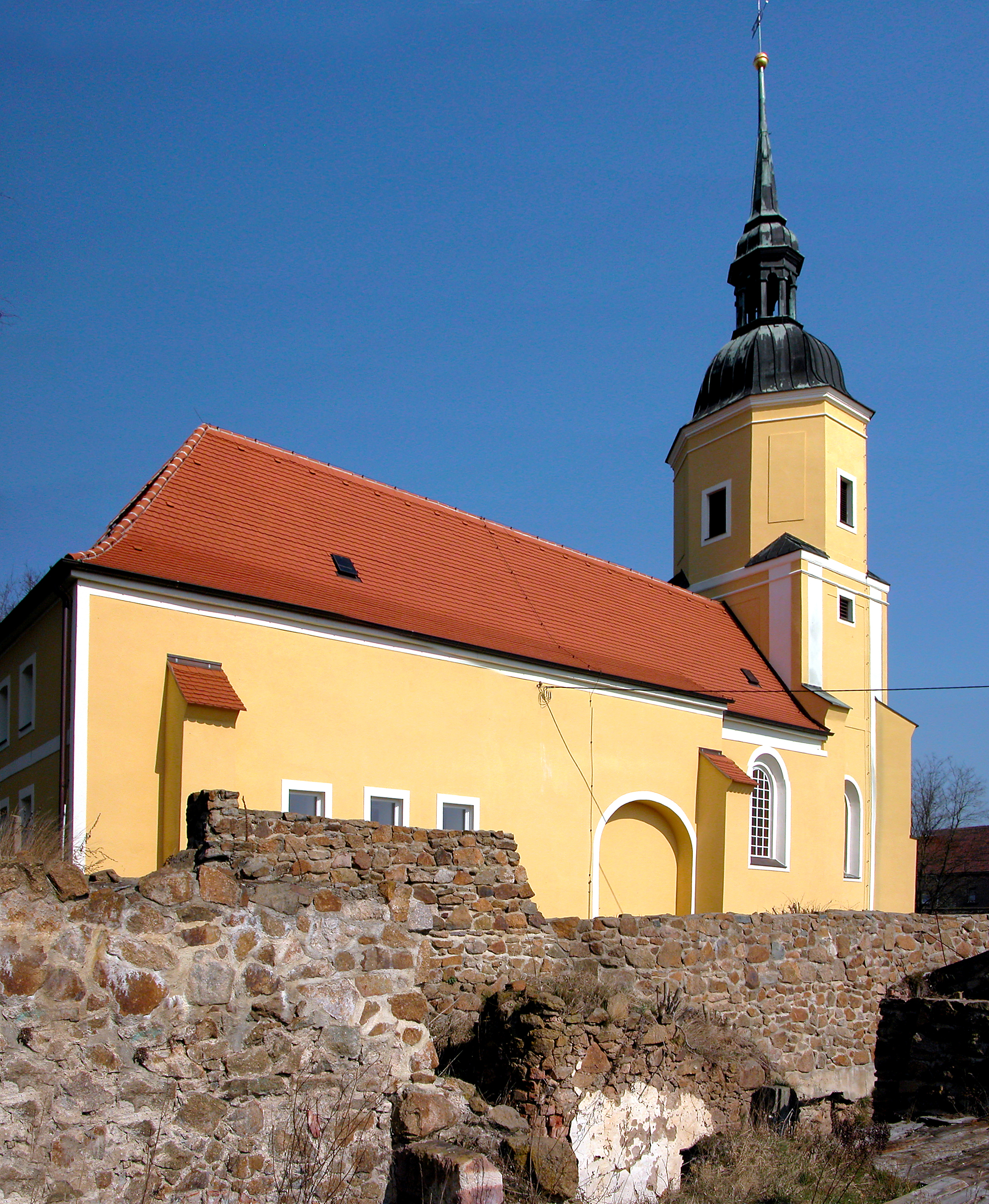 23.03.2012 04807 Nitzschka (Wurzen): Lukaskirche (1708), Dorfkirche Obernitzschka (GMP: 51.308578,12.757540). Vorn die Ruine des einstigen Schlosses, Am Rittergut 9-11. [DSCNn3454-3455.TIF]20120323305MDR.JPG(c)Blobelt